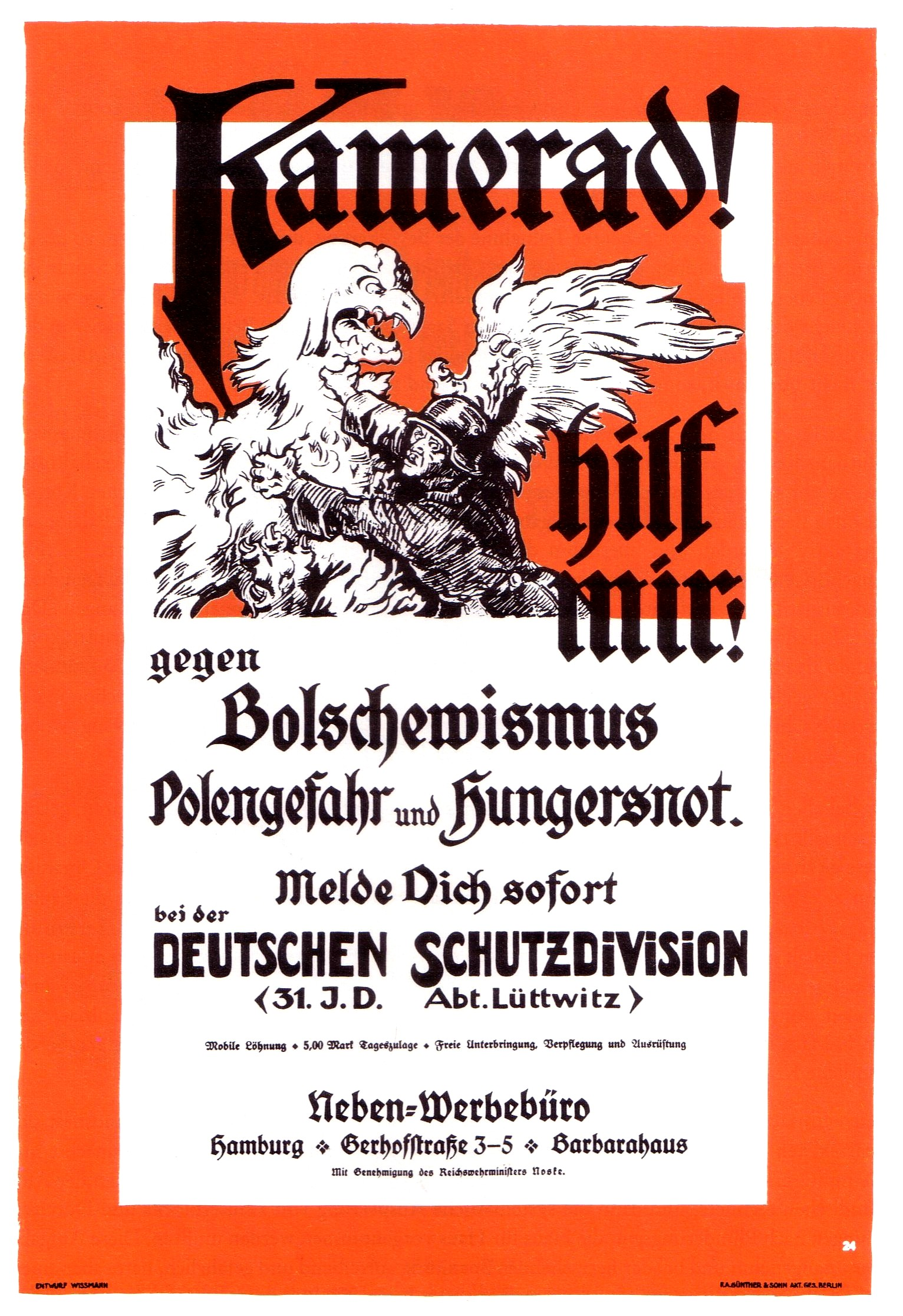 H. Wissmann. Werbeplakat der deutschen Freikorps, Berlin, 1919. Text: Kamerad!Hilf mir!gegen Bolschewismus Polengefahr und Hungersnot. Melde Dich sofort bei der DEUTSCHEN SCHUTZDIVISION (31. J.D. Abt. Lüttwitz) Mobile Löhnung. 5,00 Mark Tageszulage. Freie Unterbringung, Verpflegung und Ausrüstung. 90,0 x 60,0 cm